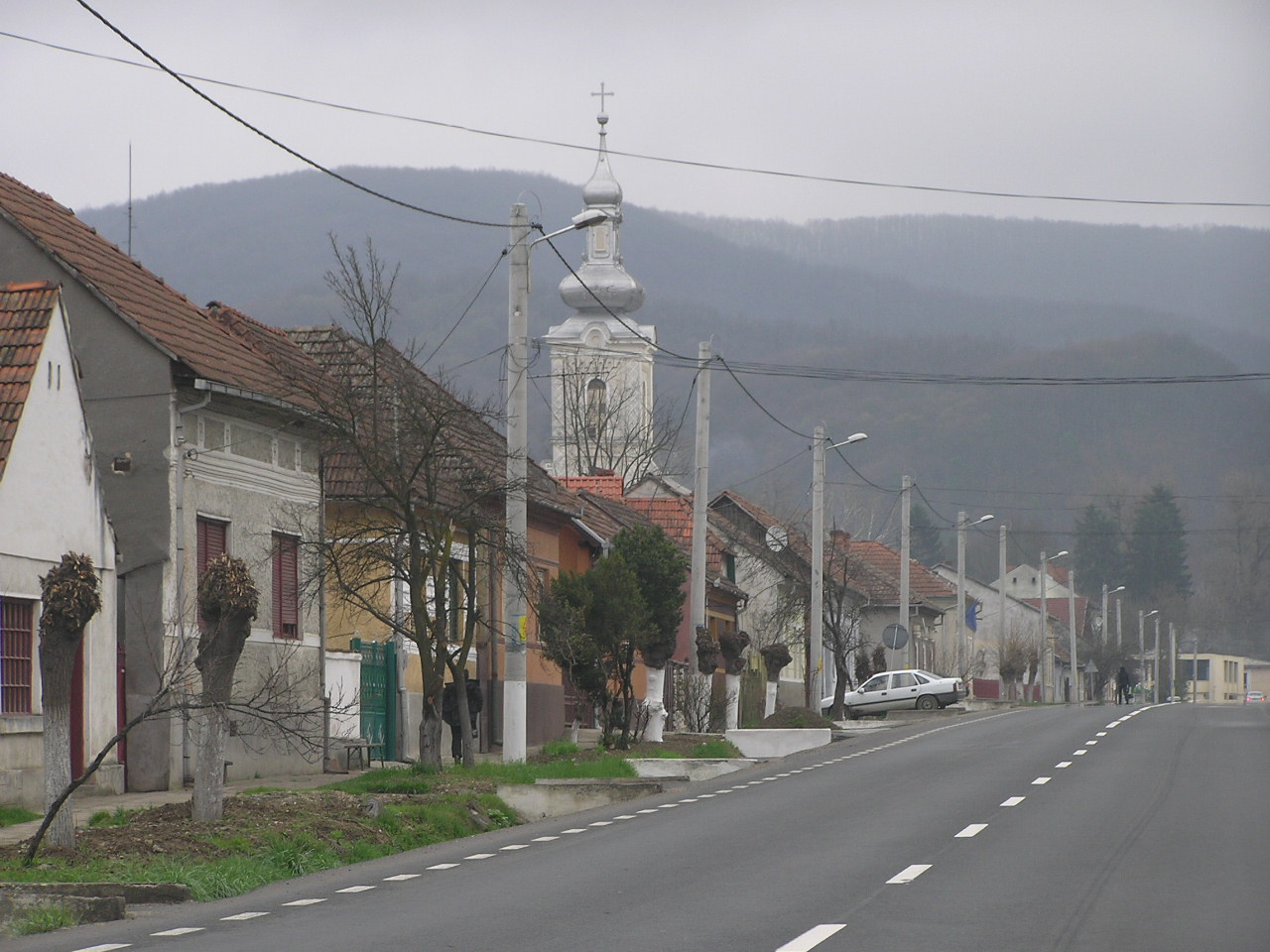 Kirche in Săvârşin, Kreis Arad, Rumänien